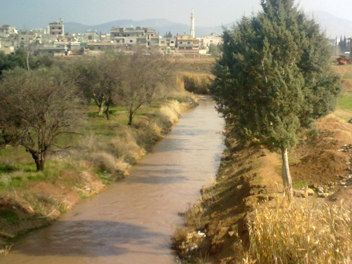 2011 نهر اللعوج river